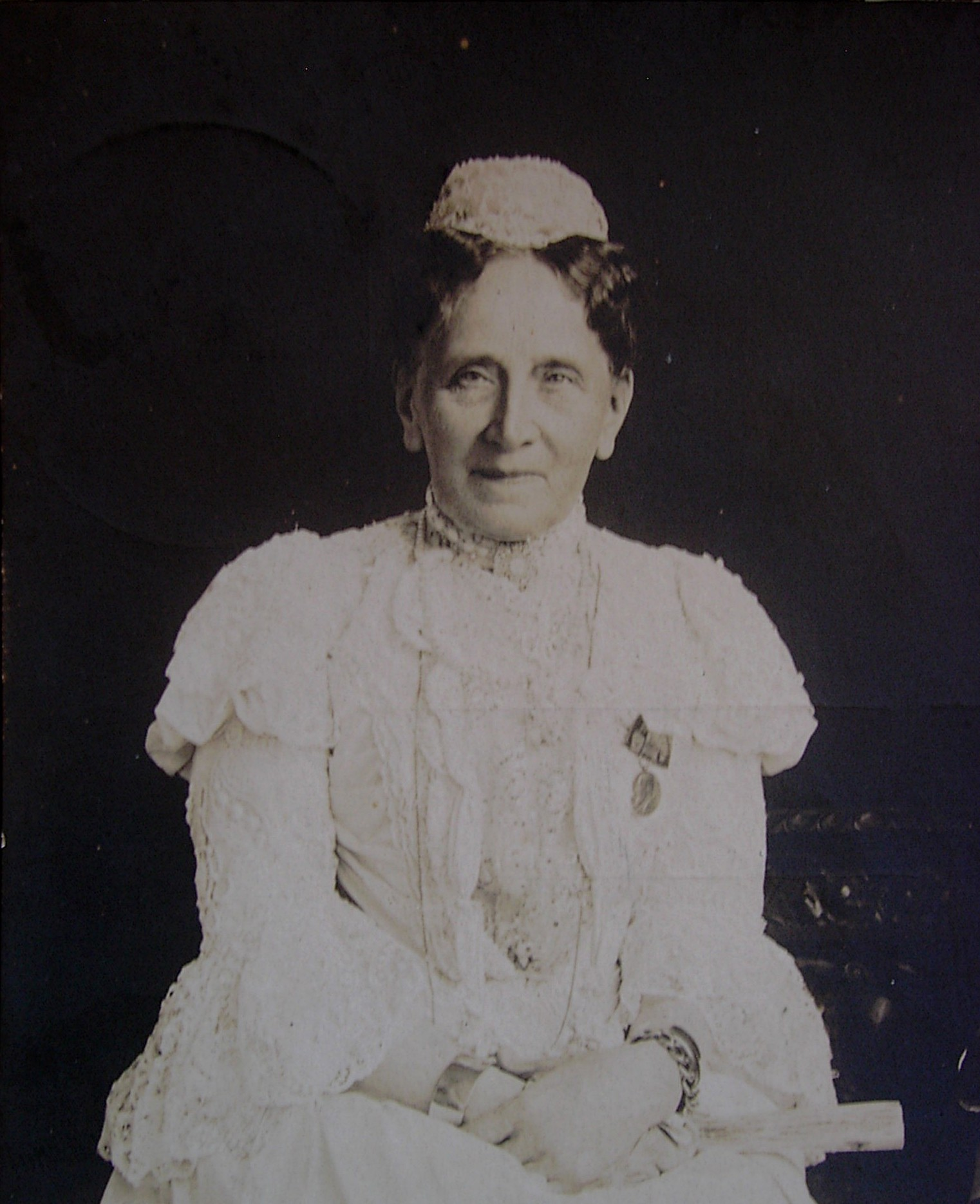 Großherzogin Luise von Baden, Prinzessin von Preußen (1838–1923), im Jahr der Goldenen Hochzeit (1906).